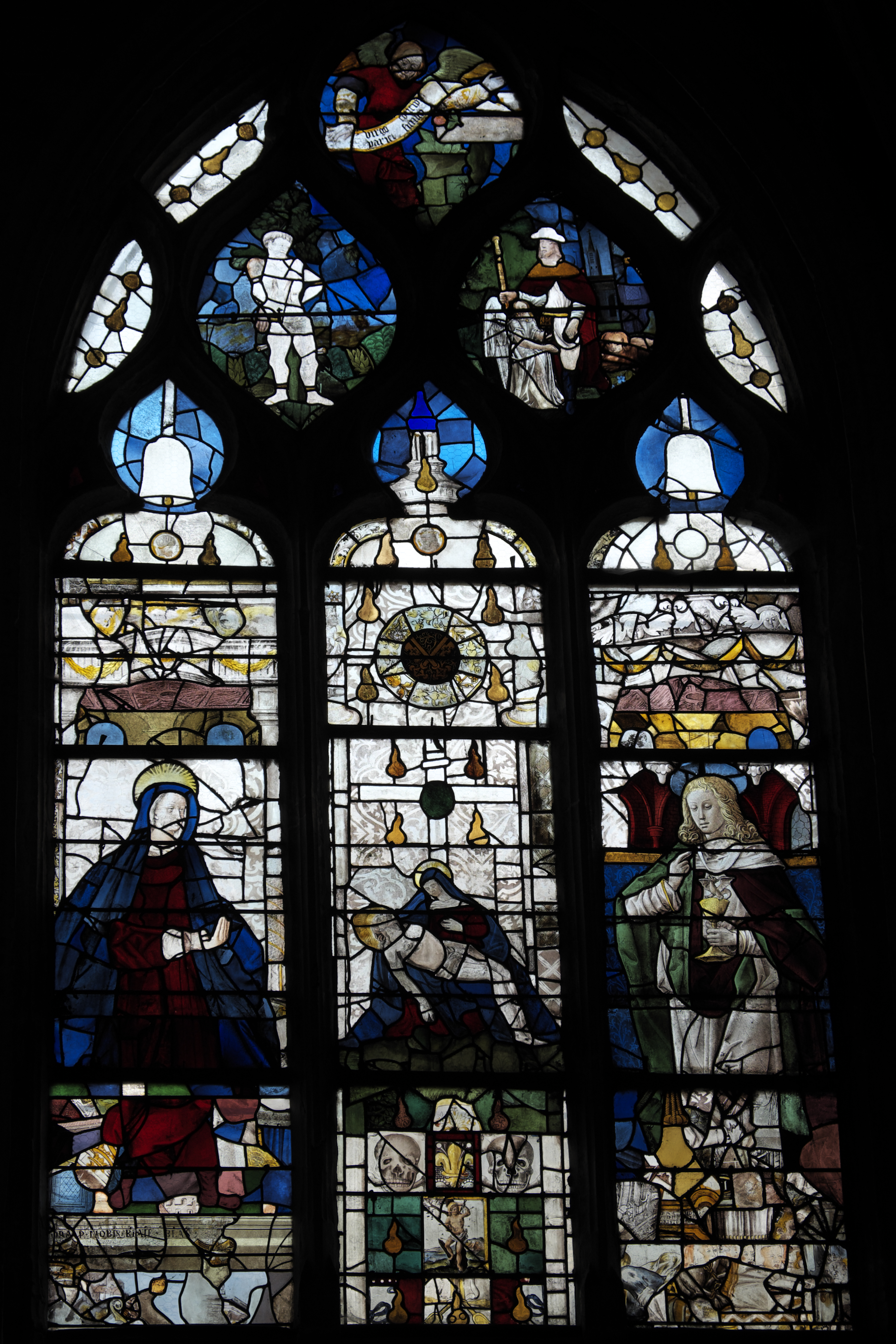 Katholische Kirche Saint-Pierre in Dreux im Département Eure-et-Loir (Centre-Val de Loire/Frankreich), Bleiglasfenster (baie 29) in der Vinzenzkapelle, aus dem 16. und 17. Jahrhundert, Darstellung: Maria (links), Pietà (Mitte), Apostel Johannes (rechts), hl. Sebastian (unten Mitte)